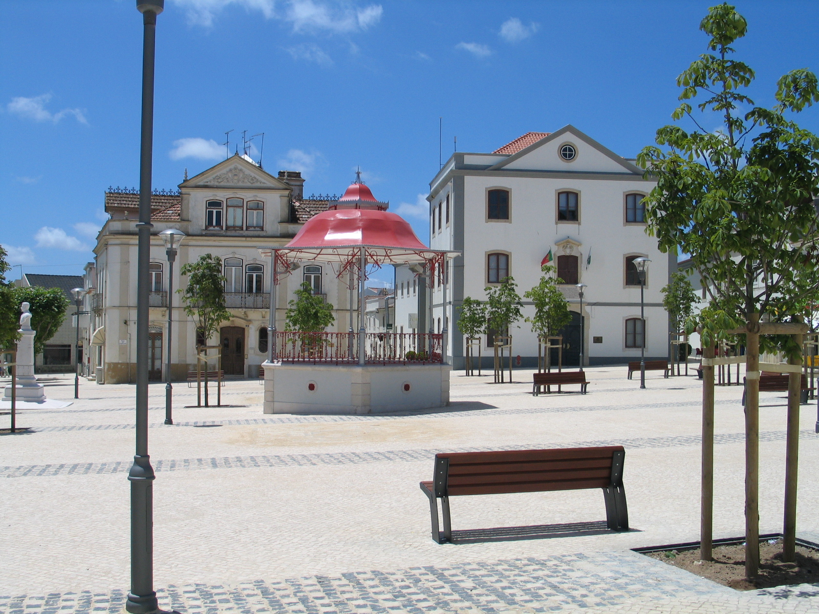 Sobral de Monte Agraço, Portugal main square